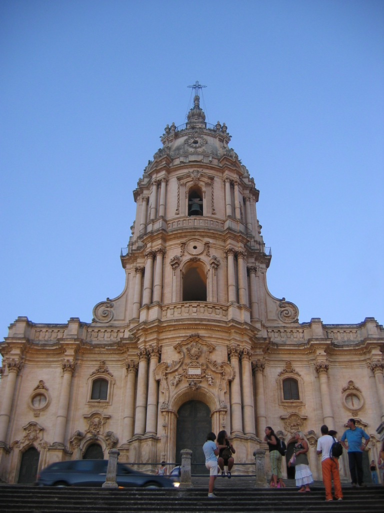 Ilustración 10: La catedral de San Jorge, Modica